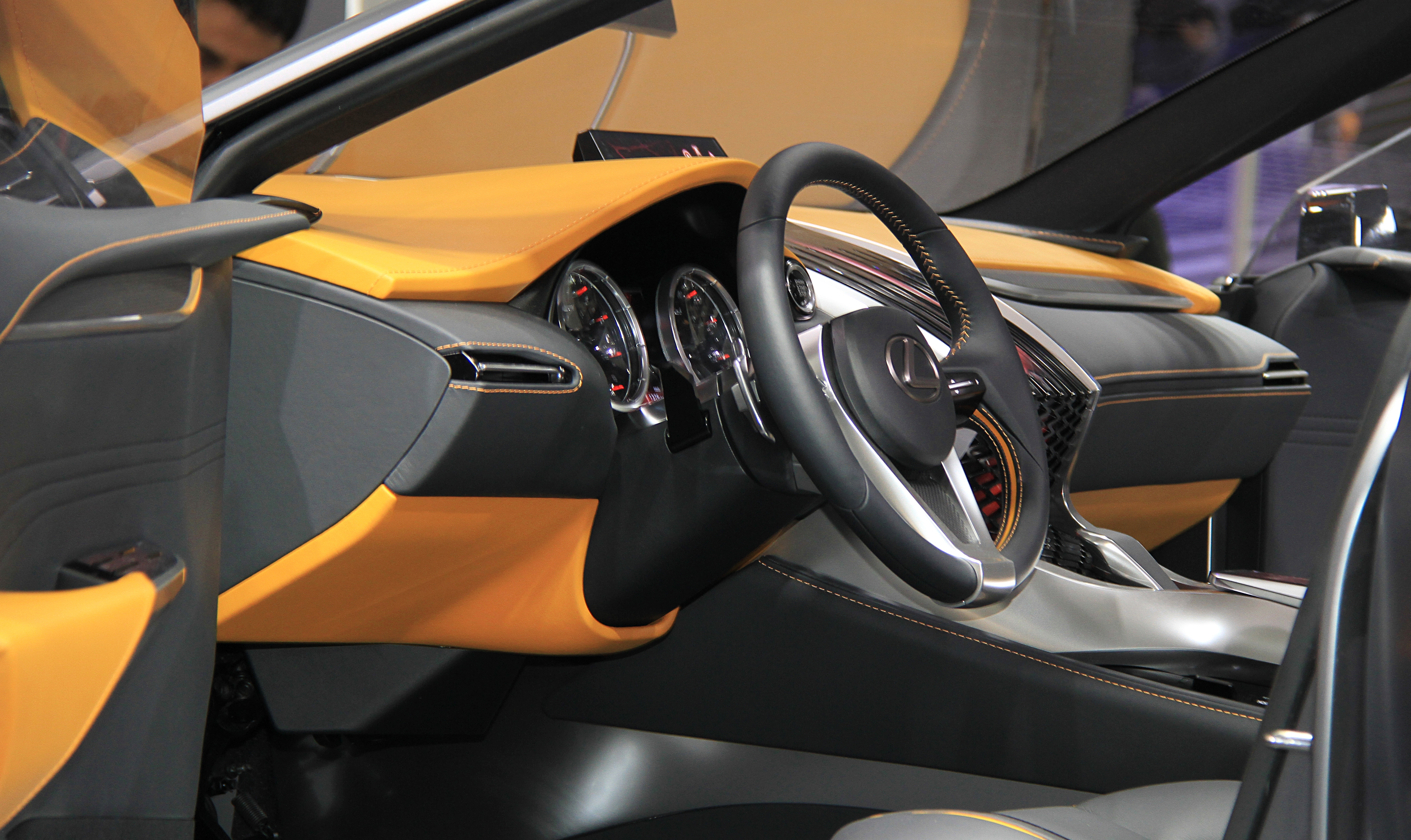 Lexus LF-NX